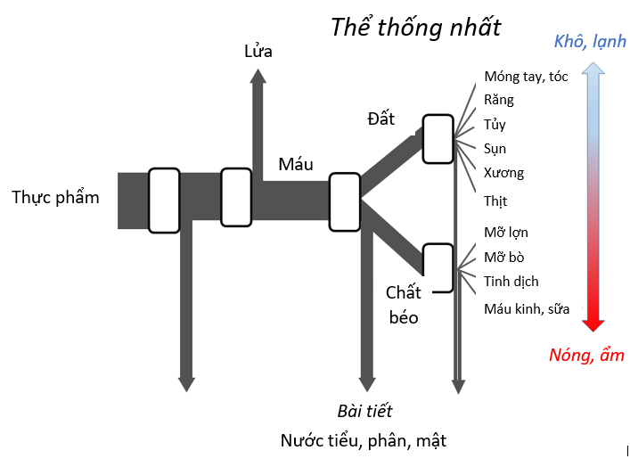 Mô hình trao đổi chất đơn giản của Aristole